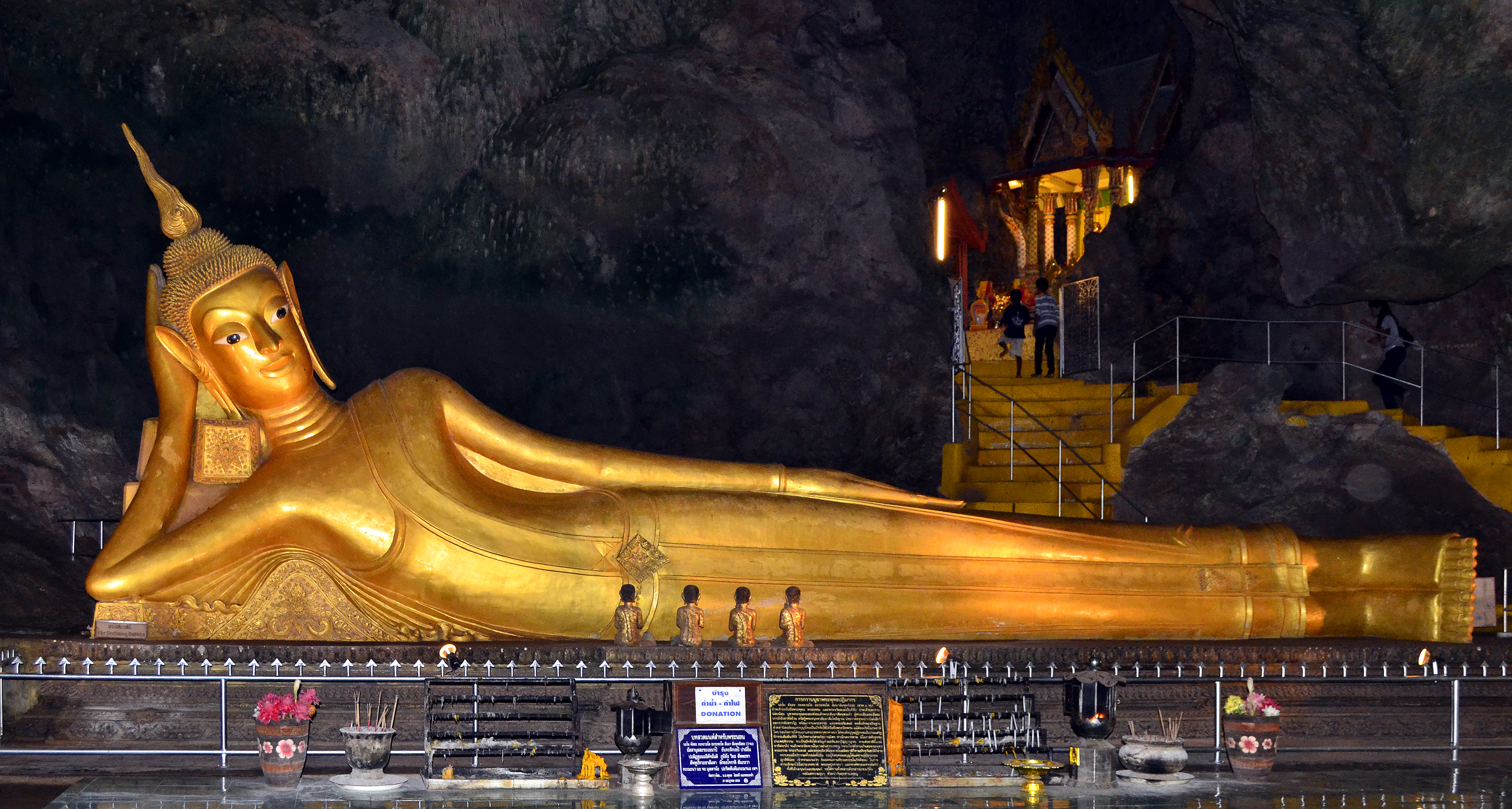 Wat Suwan Kuha